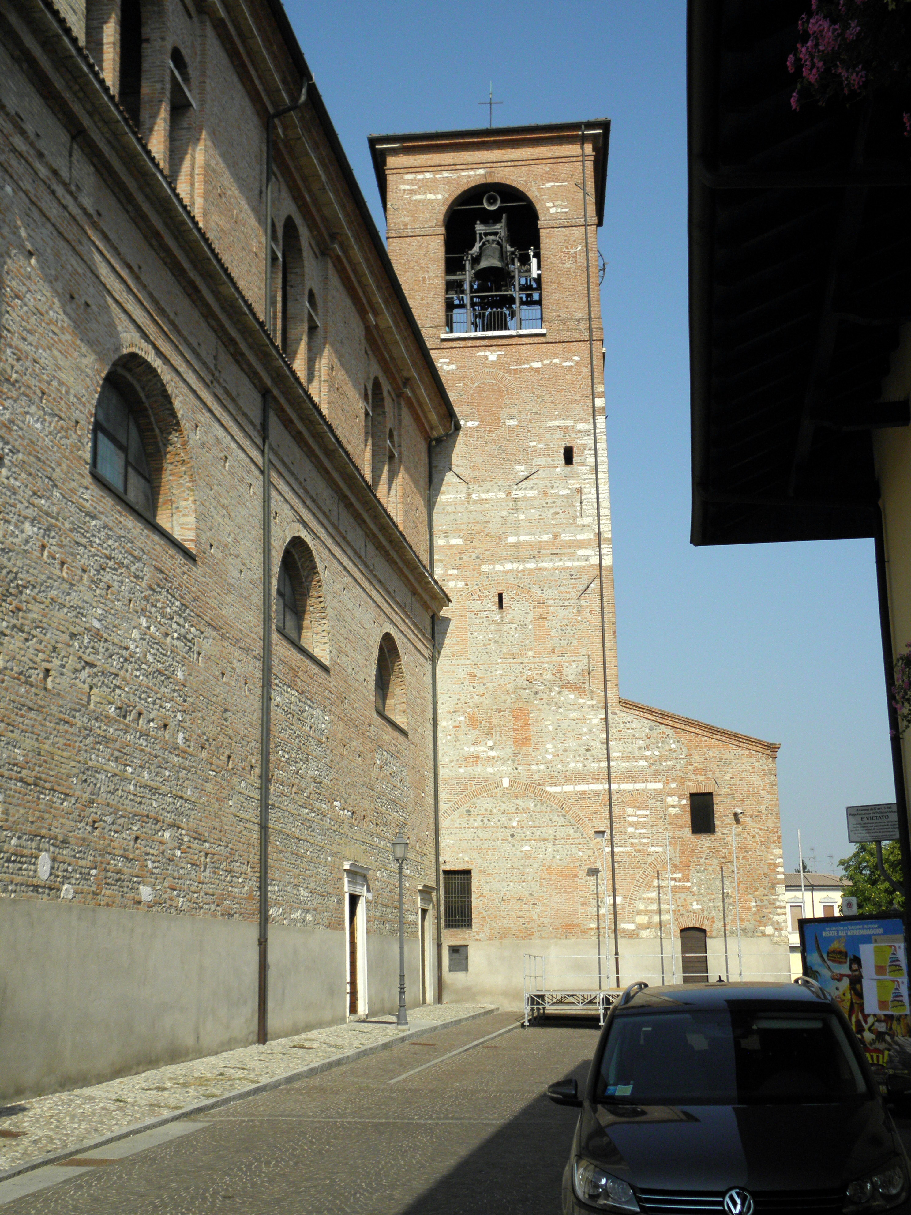 Ghedi, Chiesa parrocchiale di Santa Maria Assunta: lato sinistro e campanile.